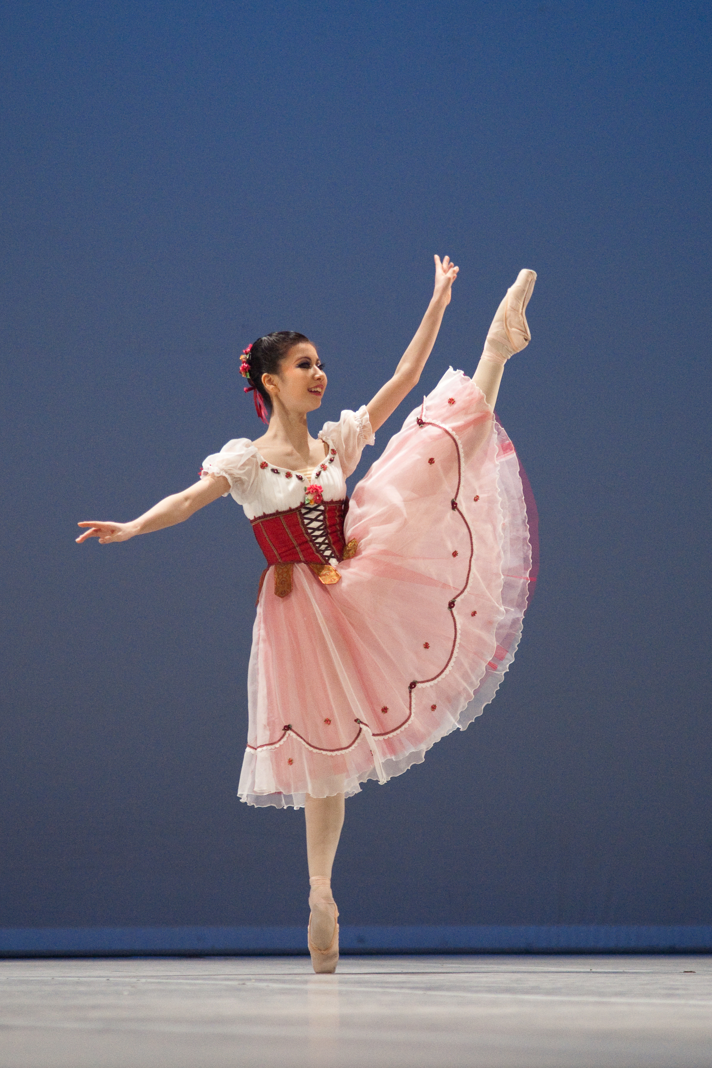 Variation extraite de Coppélia au Prix de Lausanne 2010.